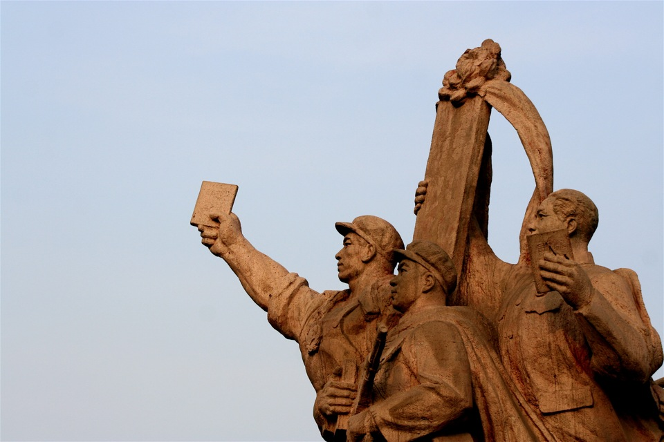 Yangtse Bridge in Nanjing